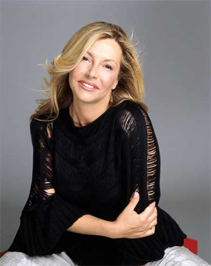 La periodista Cristina Tárrega.